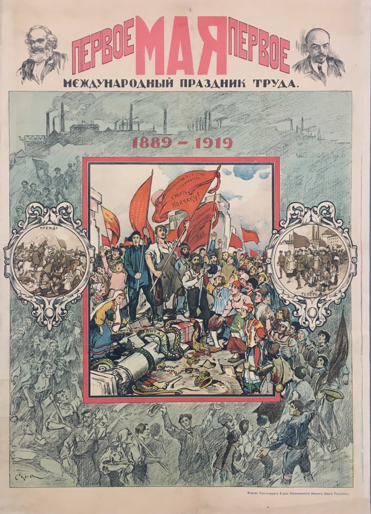 Первое мая. Международный праздник труда. 1889-1919.jpg